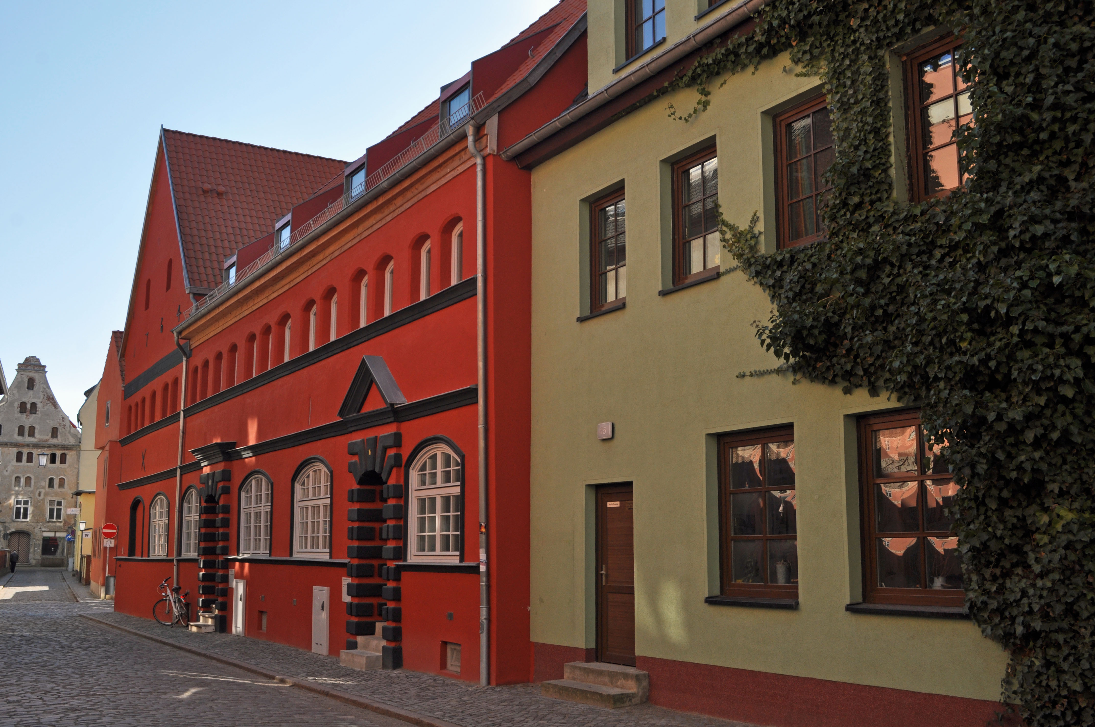 Gebäude bzw. Gebäudedetail in Stralsund. Straße und Hausnummer siehe Dateiname. Das Gebäude ist als Baudenkmal ausgewiesen, siehe dazu die Liste der Baudenkmale in Stralsund.